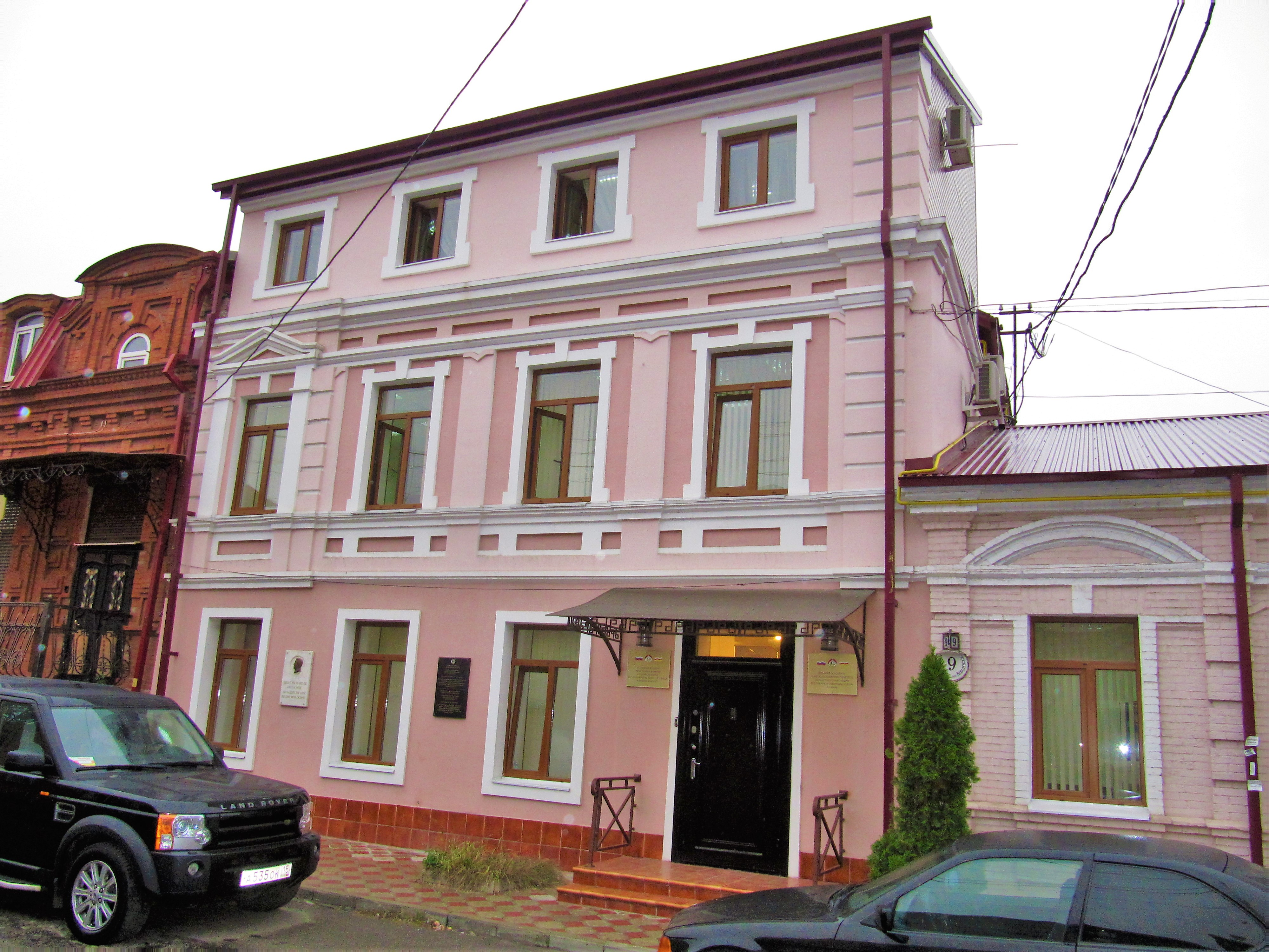 Дом, где в 1912 - 1921 гг. жил революционер Киров С.М. (филиал музея Кирова С.М. и Орджоникидзе Г.К).